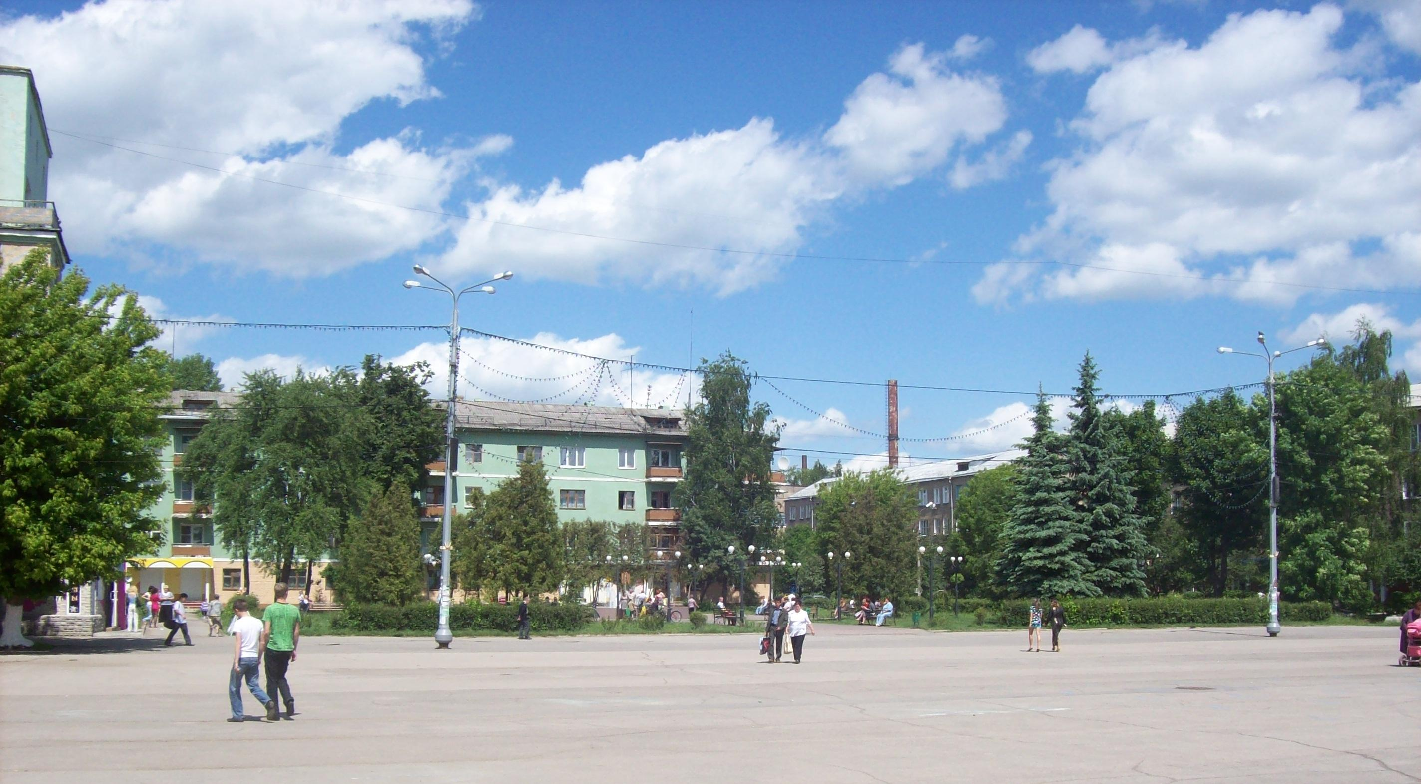 Тульская область. г.Новомосковск. Советская площадь в центральной части города.